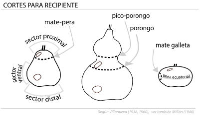 Cortes para recipientes de mate